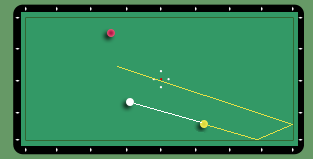 tiro biliardo striscio